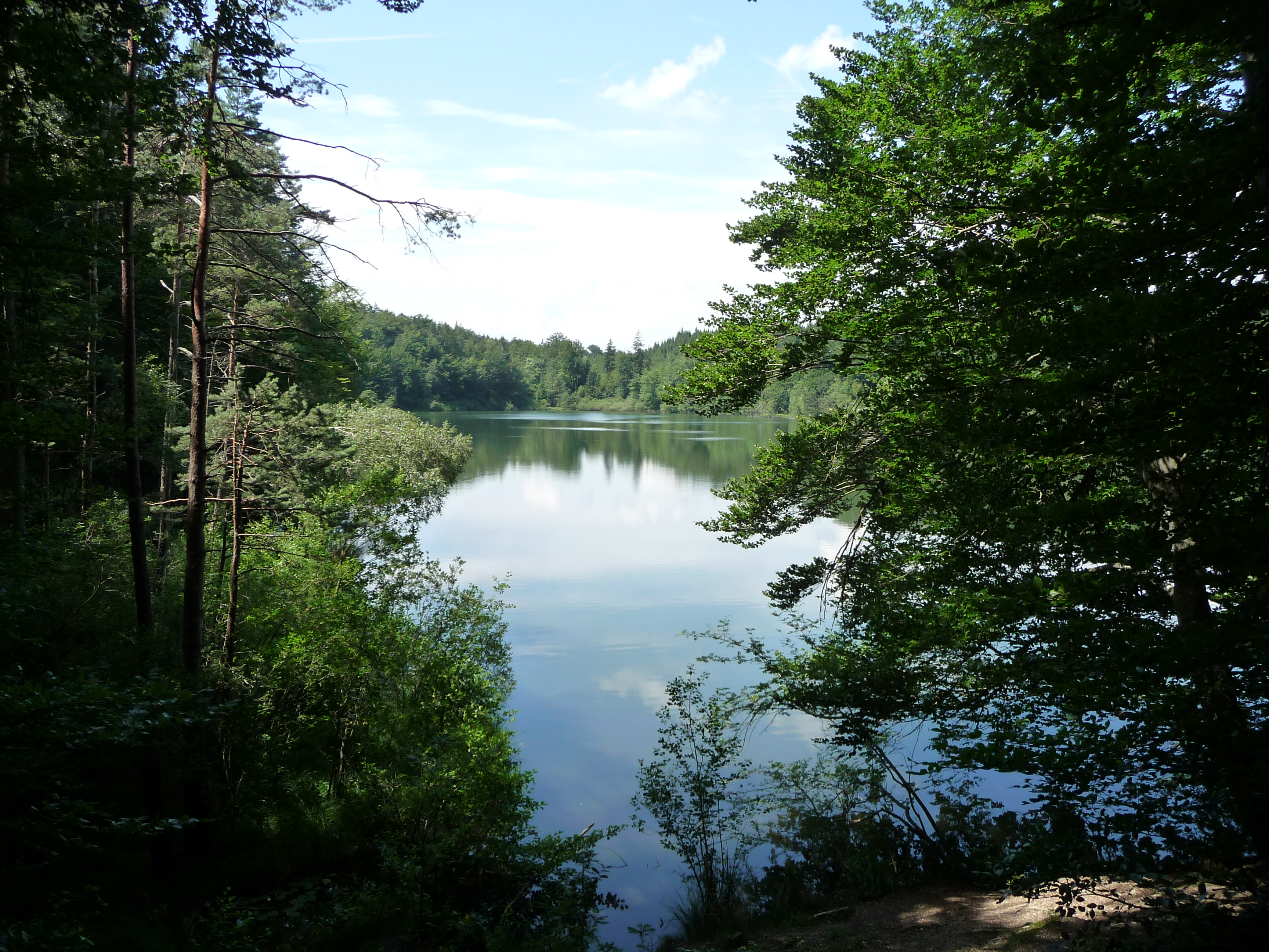 Eggstätt-Hemhofer-Seenplatte,Einbesee